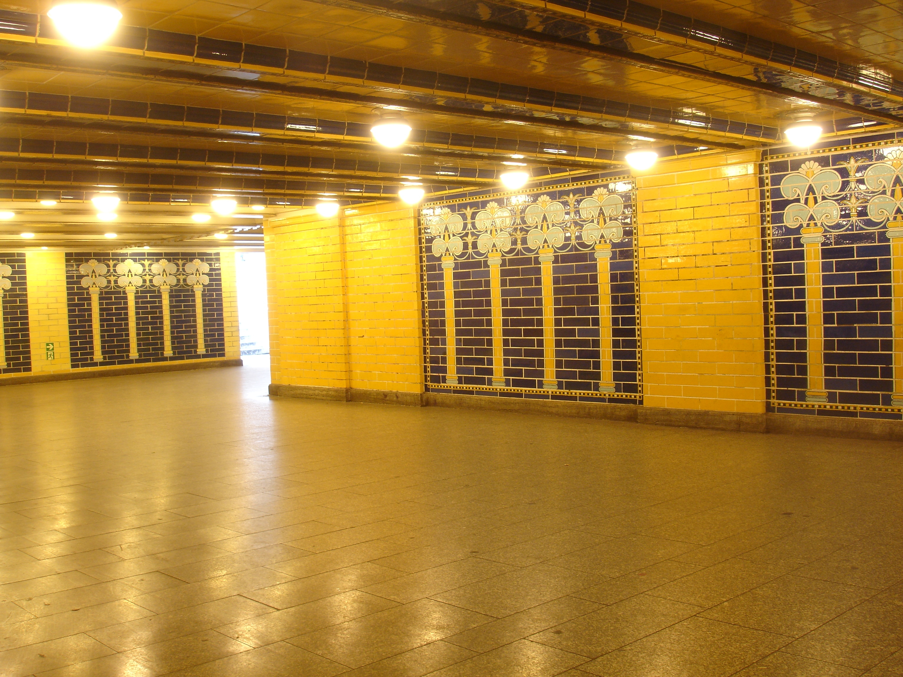 U-Bahnhof Klosterstraße (U2) in Berlin-Mitte, Südzugang/Altes Stadthaus. Babylonische Palmen: Dekorative Ausstattung des am 1. Juli 1913 eröffneten U-Bahnhofs Klosterstraße, entworfen vom schwedischen Architekten Alfred Grenander. Die historischen Wandfliesen (Majolika aus Cadinen) haben sich nur im Südzugang erhalten. (Zitiert nach Infotafel von BVG/Freunde der Antike)